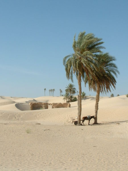 Photographie personnelle, prise près de Douz (Tunisie) Auteur : Asram date : 2006-01-01